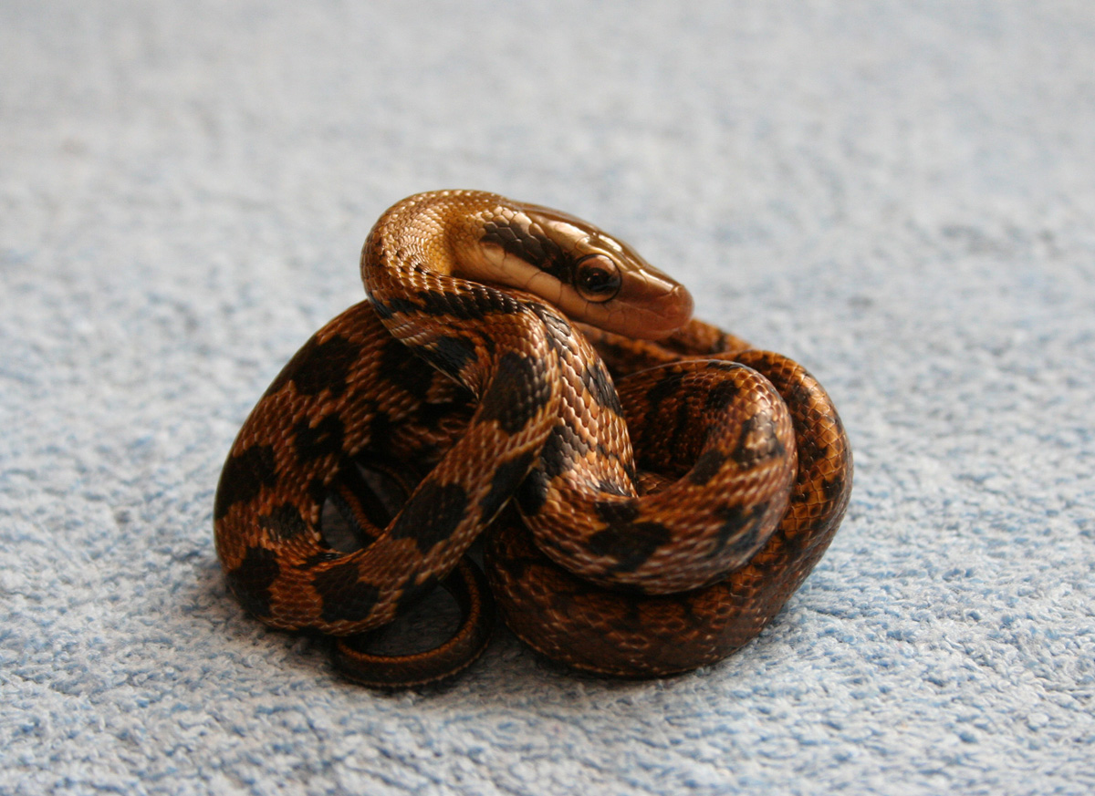 Photo by Seweryn Olkowicz